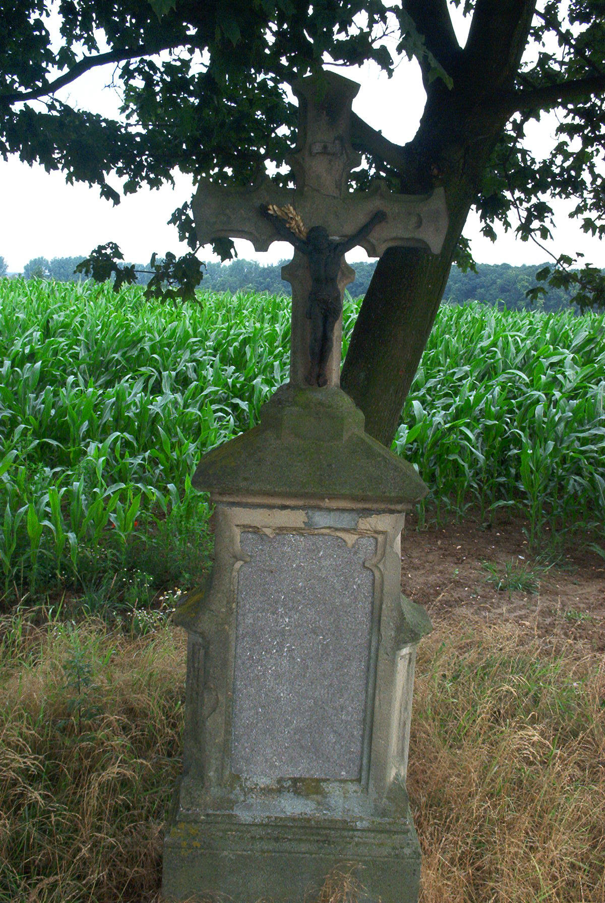 Das Rote Kreuzchen an der K 16 östlich von Hochkirchen